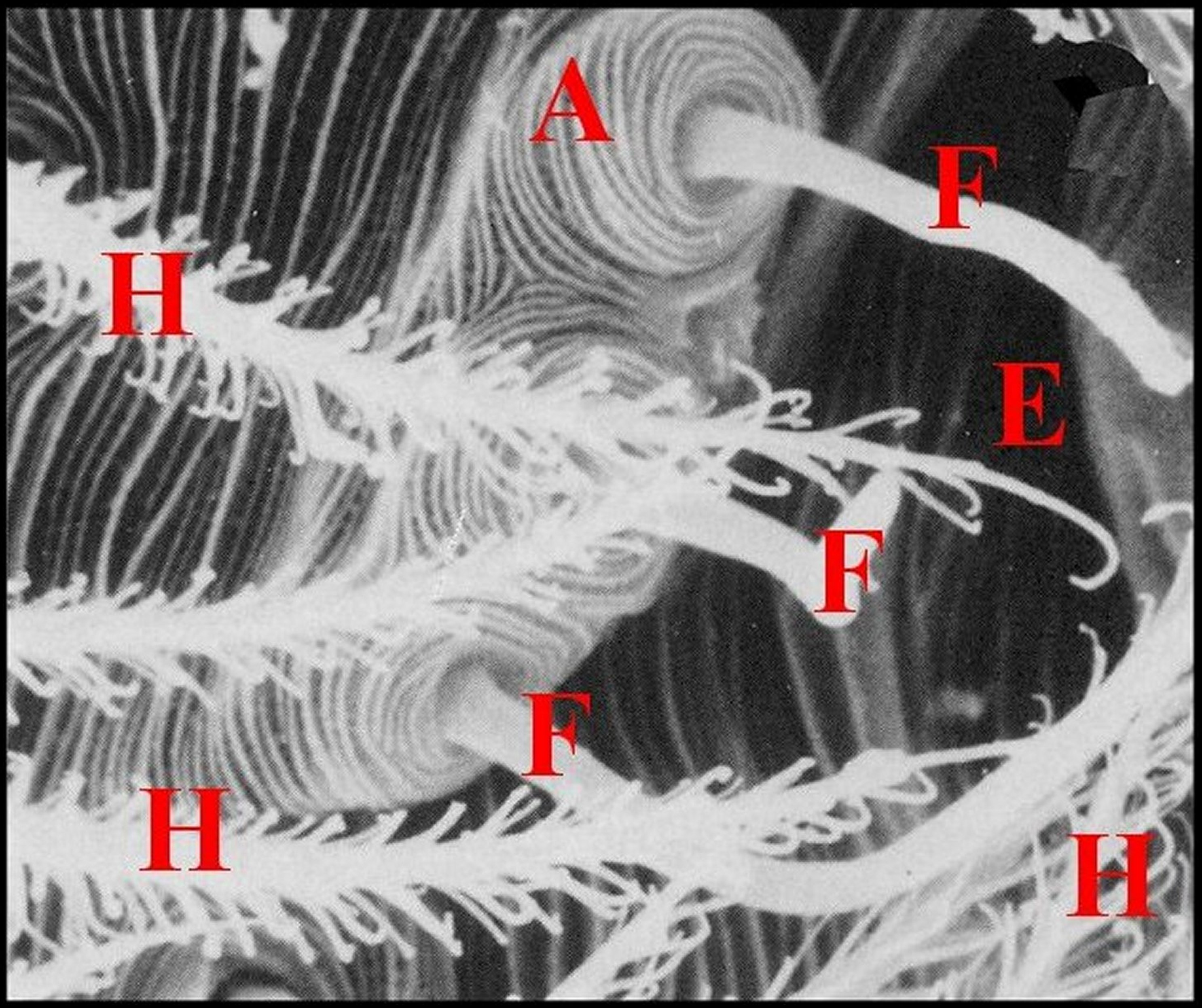 Fusules épigastriques de Leptoneta infuscata minos. Microscopie électronique à balayage.